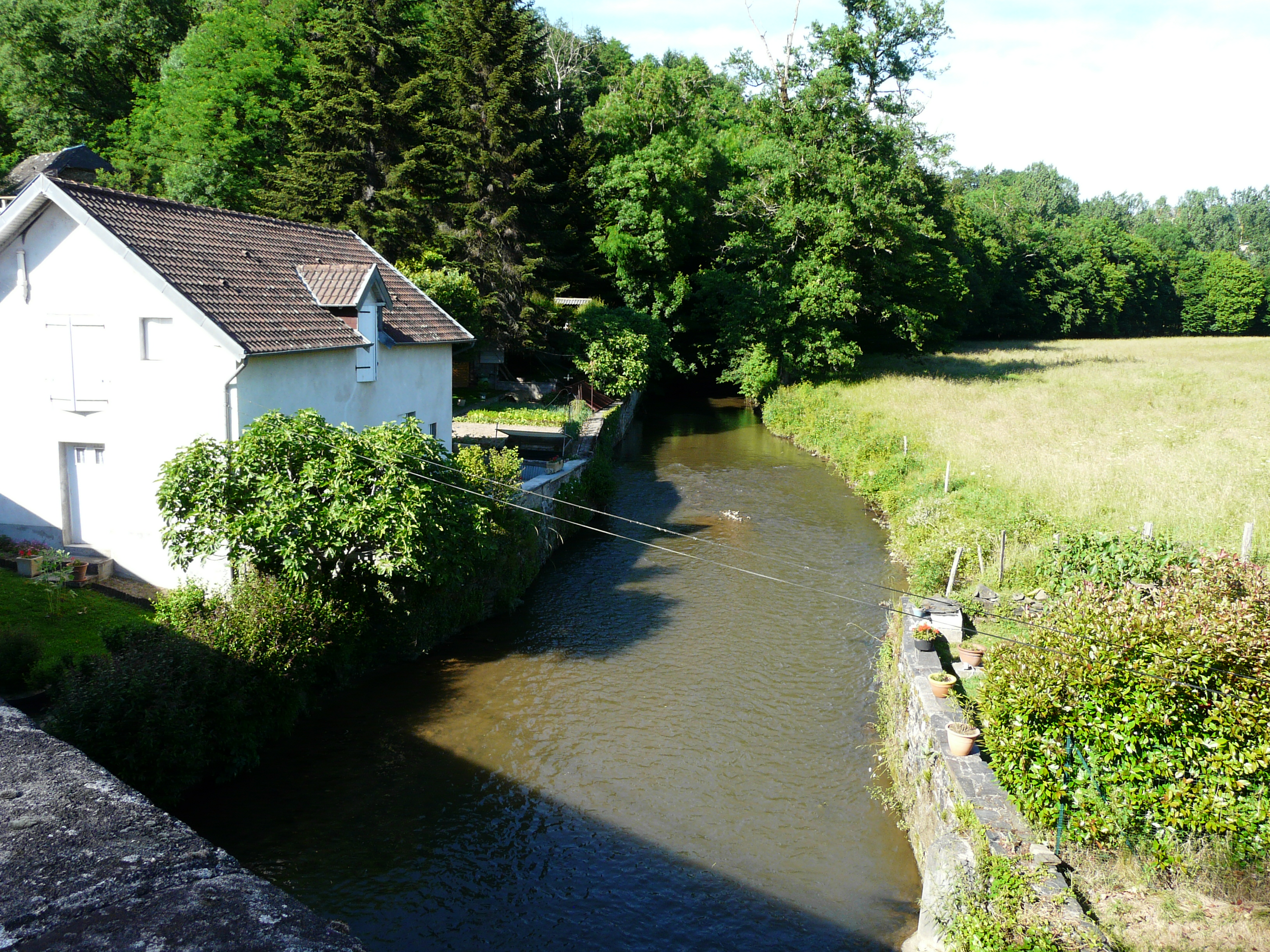 Le Maumont en amont du pont de l'Hôpital, Donzenac, Corrèze, France